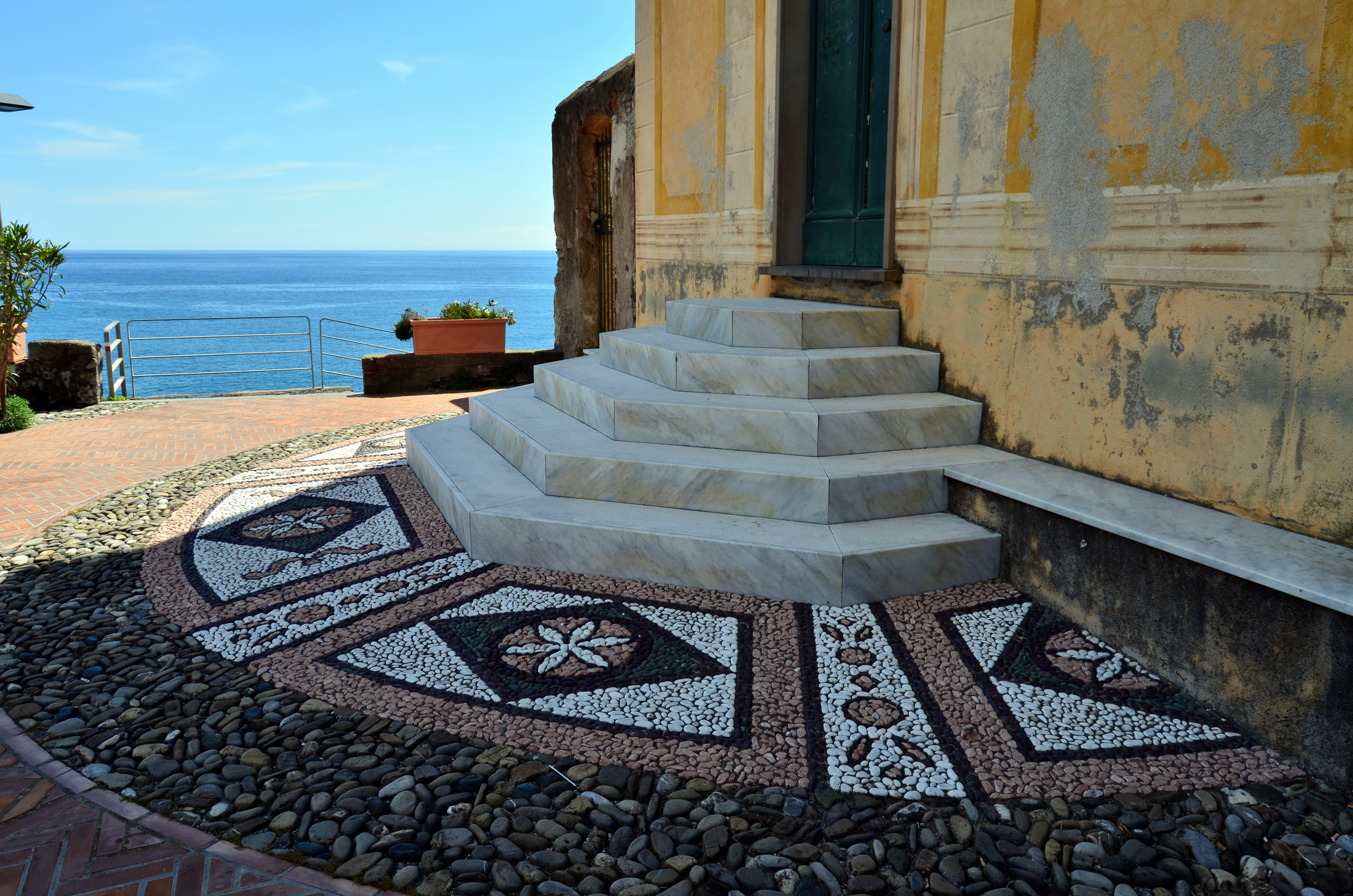 Sagrato e scalinata dell'ex oratorio di Sant'Erasmo, Bonassola, Liguria, Italia